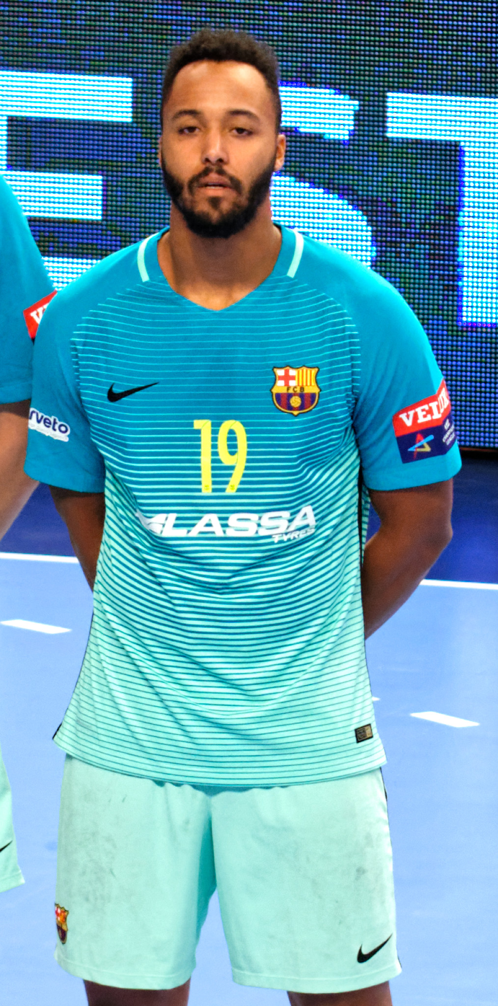 Rencontre de phase de groupe de la ligue des champions 2016-17 entre le PSG et le FC Barcelone. A Coubertin, le 12 novembre 2016.